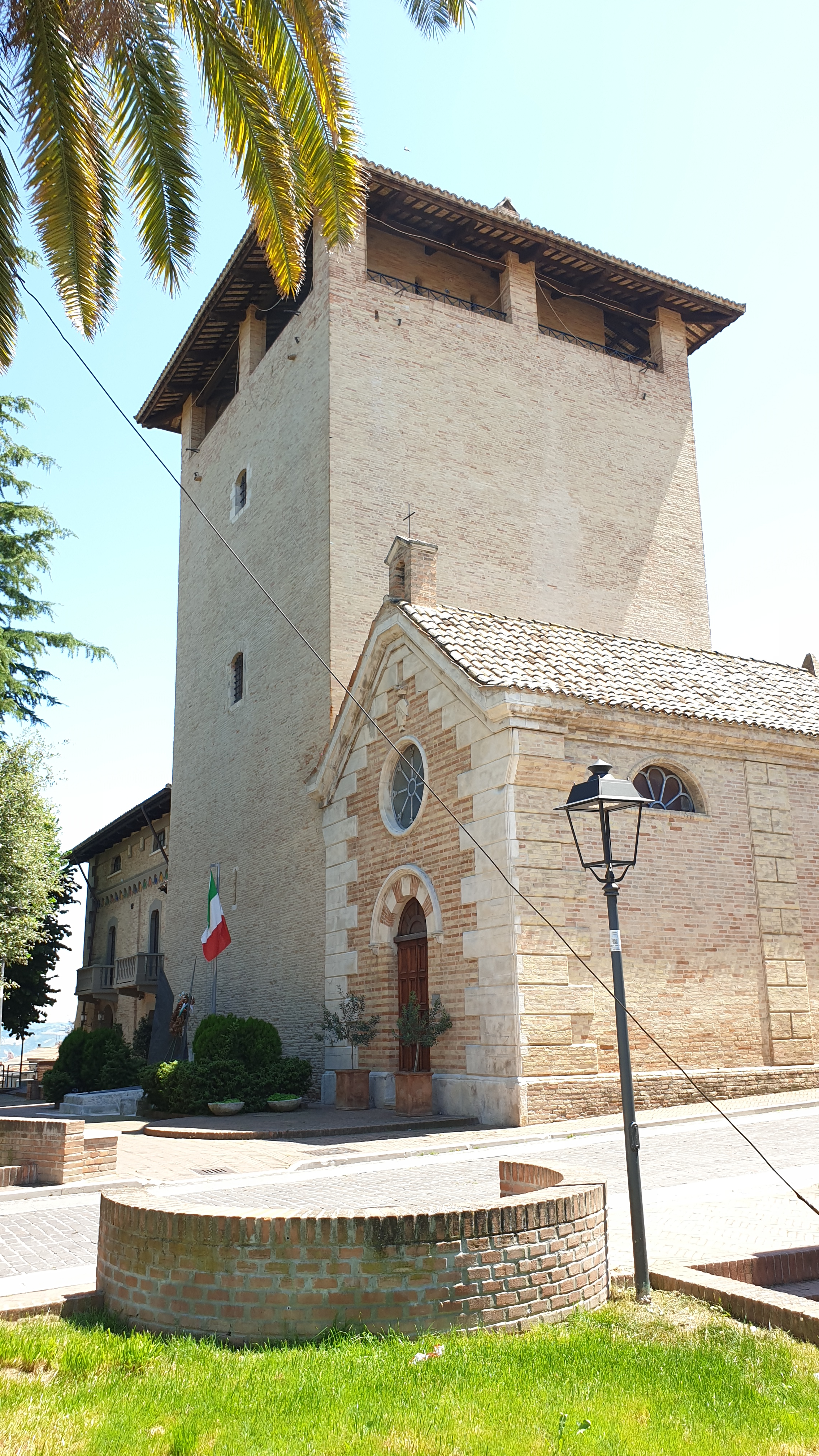 Cepagatti - Cappella di San Rocco